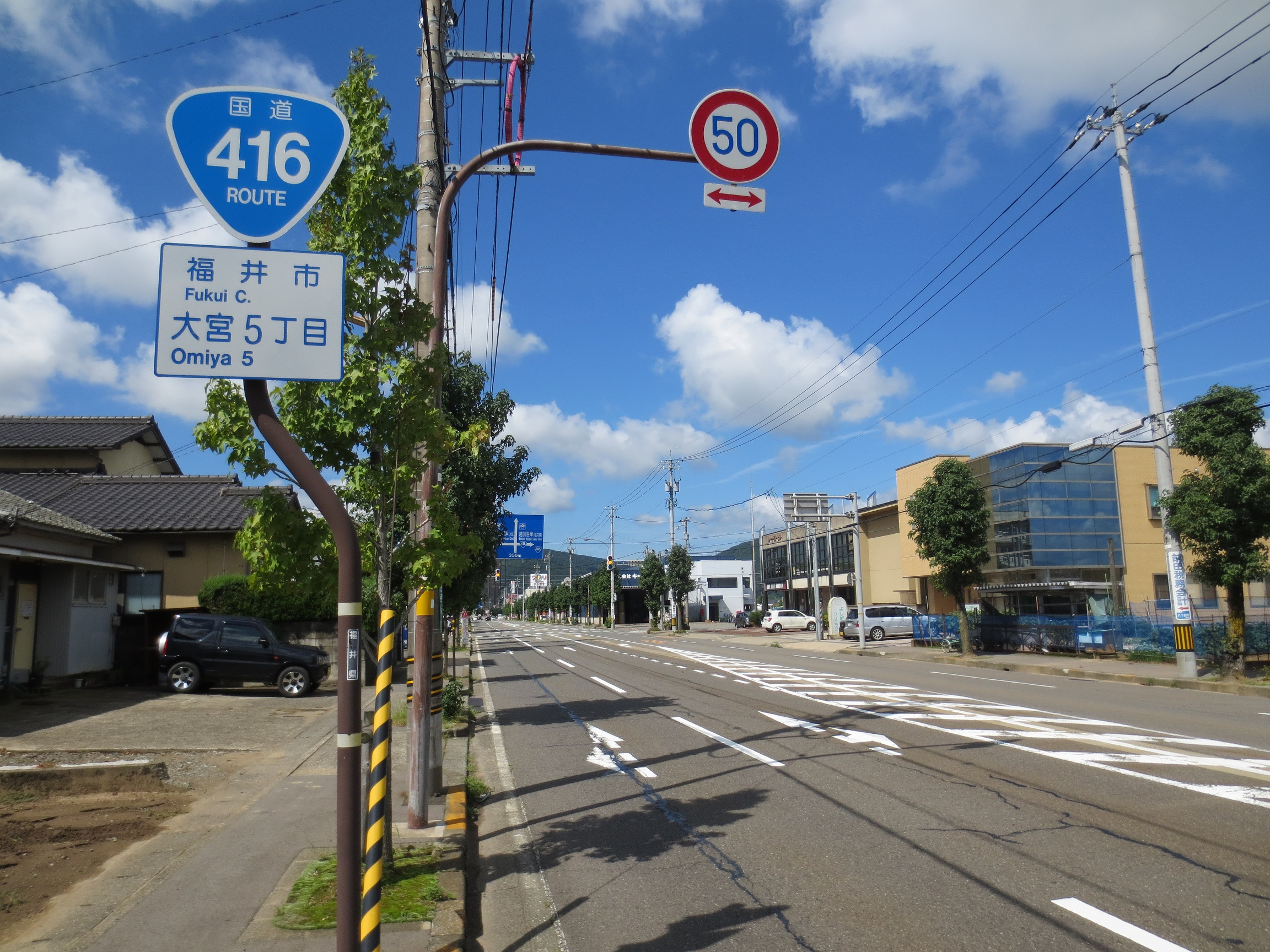 福井市大宮付近の国道416号。